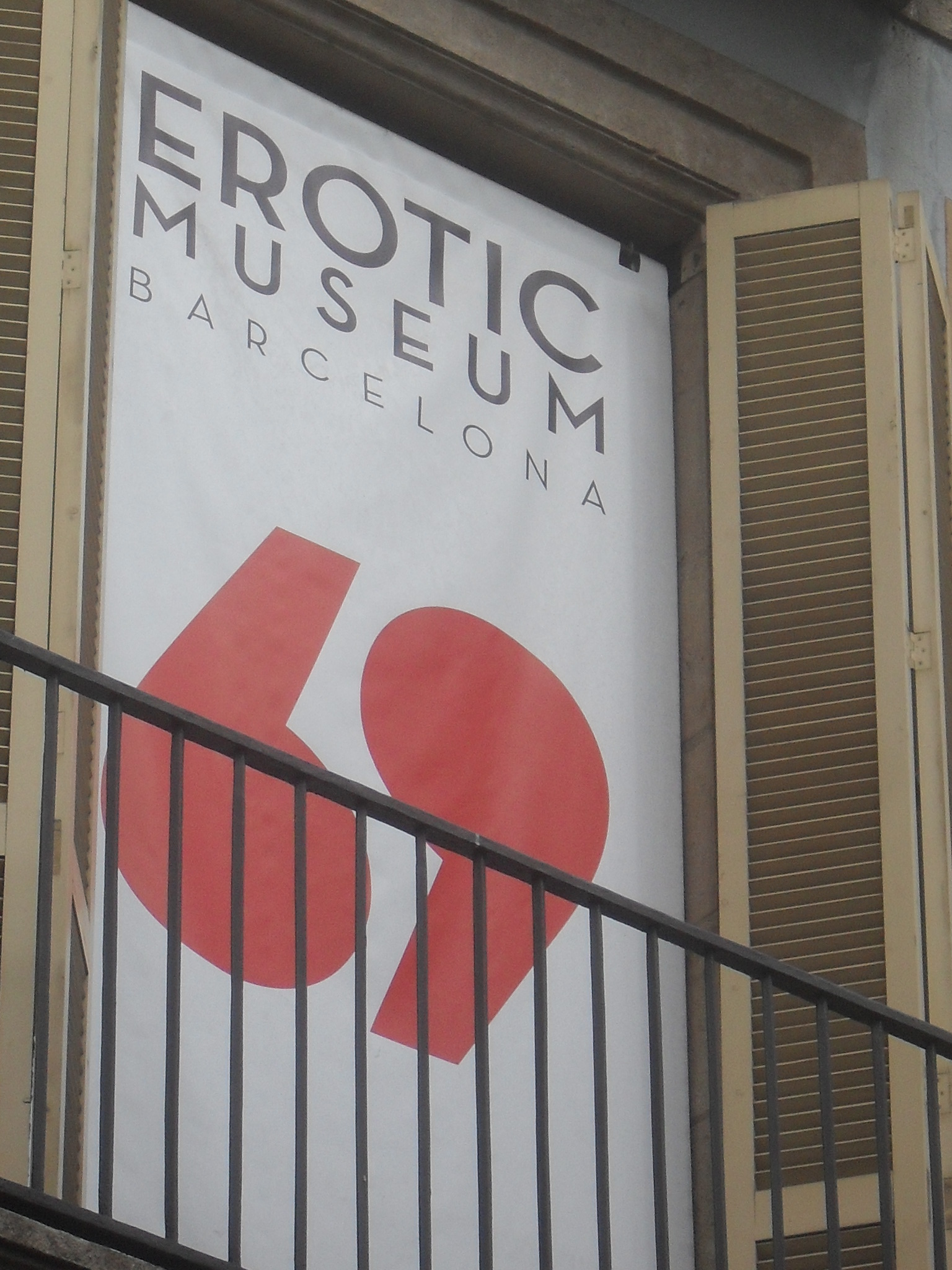 museo erotico de barcelona